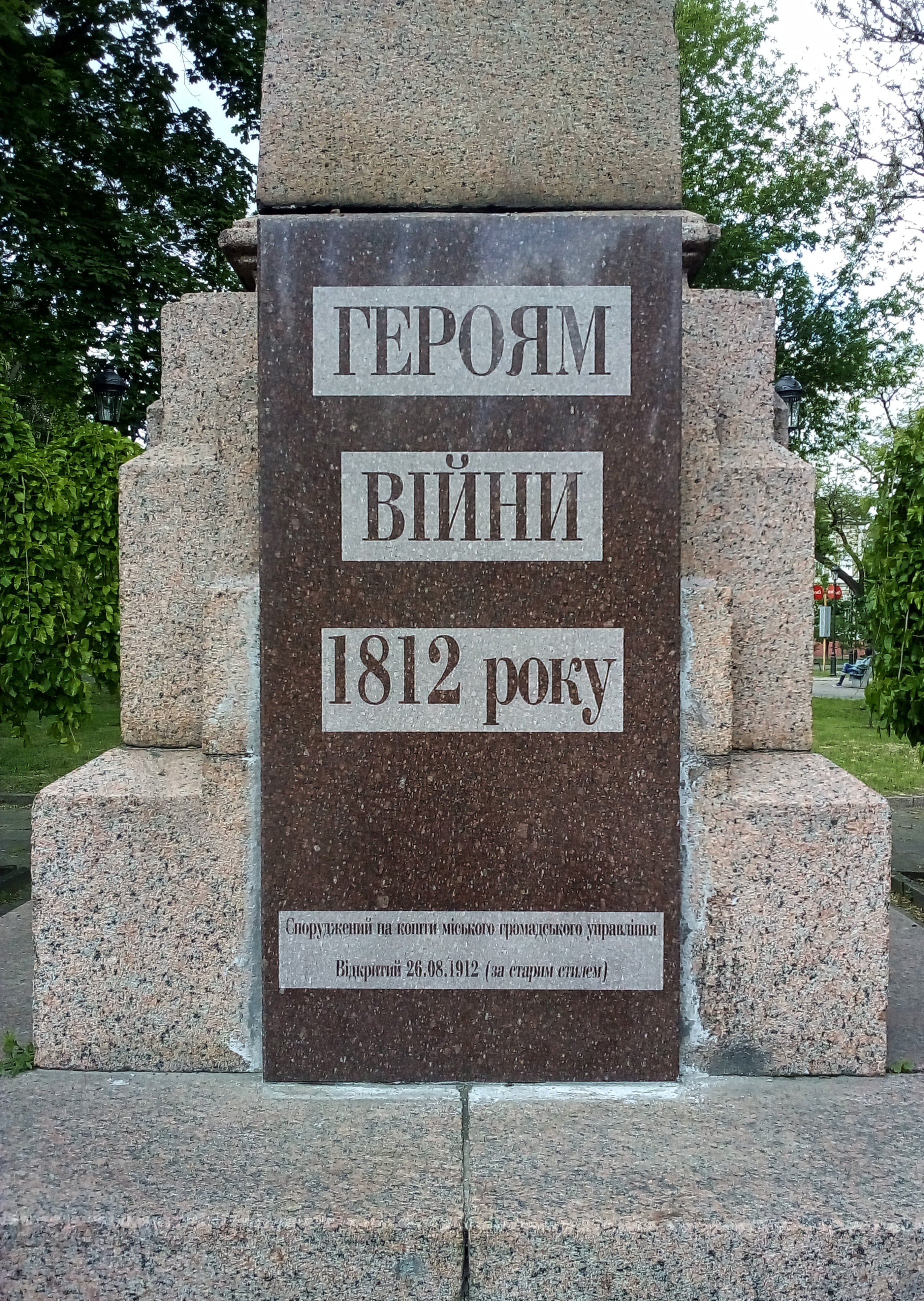 Монумент героям війни 1812 року, Миколаїв (фрагмент)